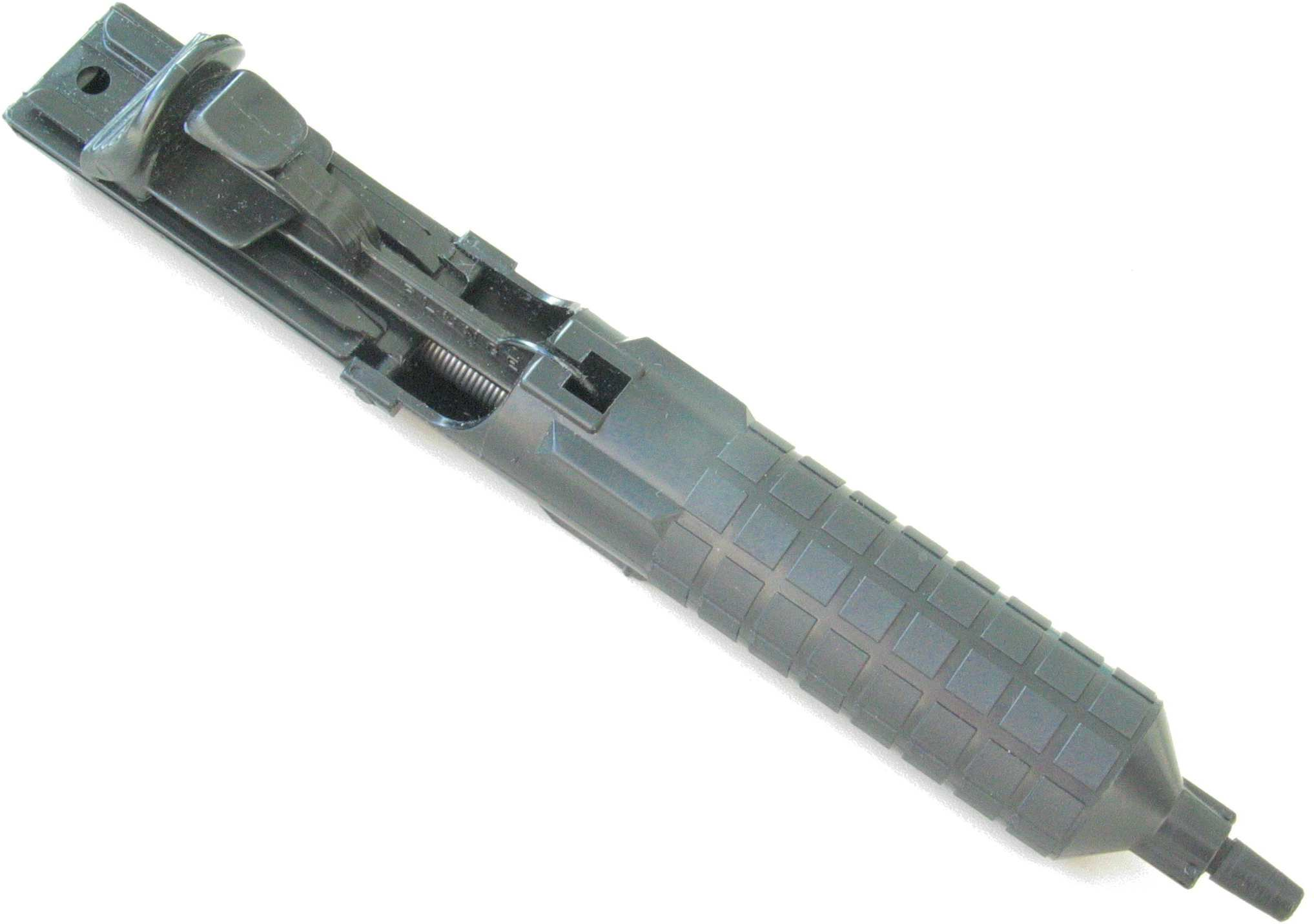 Desoldering pump